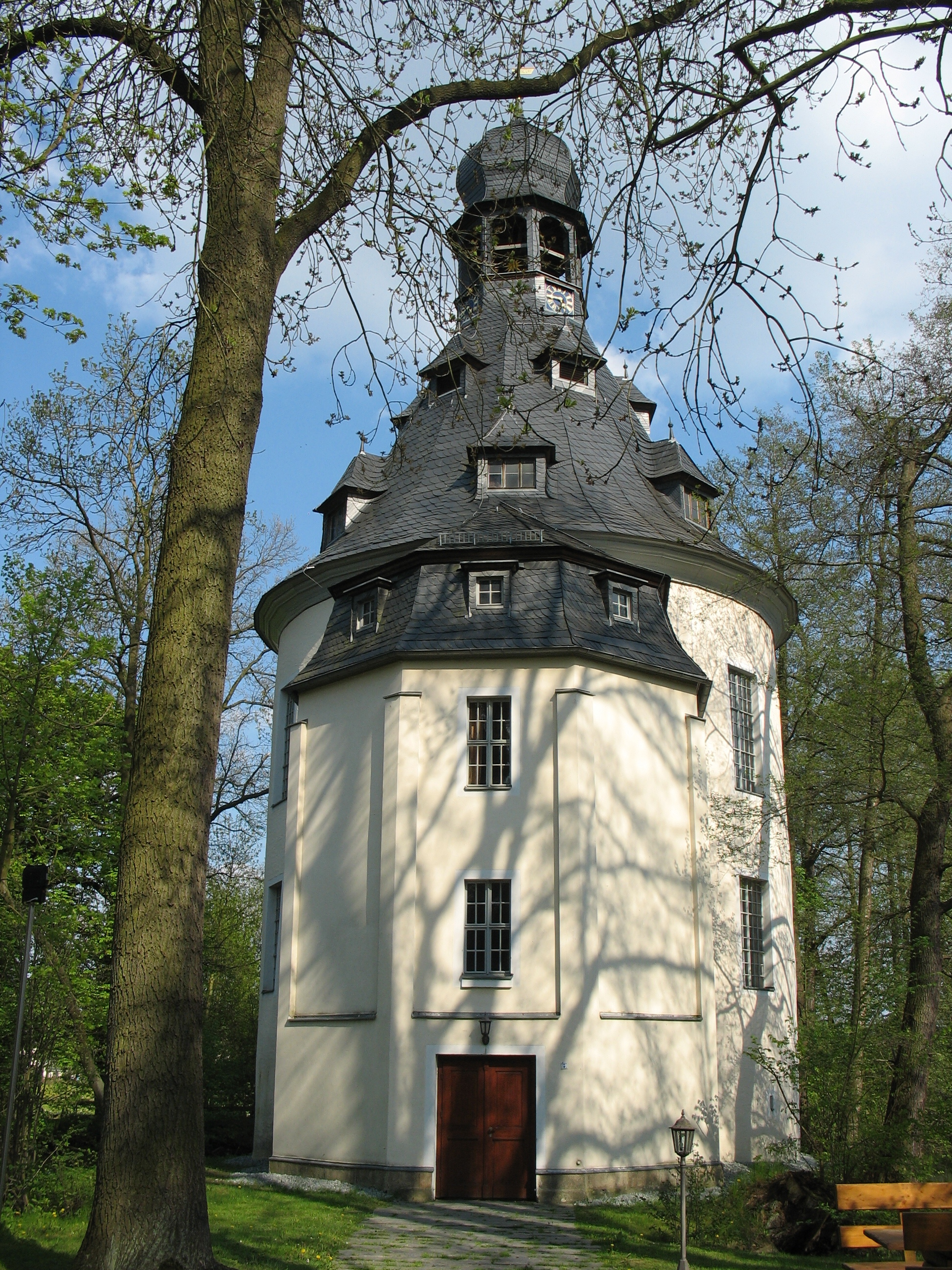 Plauen-Kauschwitz, Rundkapelle